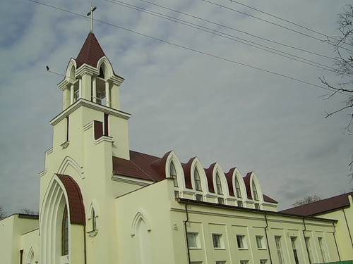 Римо-католицький костел Пресвятого Серця Ісуса у м. Херсон